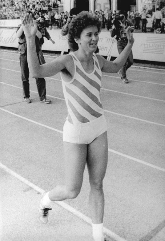 Marlies Göhr ADN-ZB Kluge 2.6.84 Erfurt: 35. DDR-Meisterschaften in der Leichtathletik- Marlies Göhr (SC Motor Jena) wurde überlegen DDR-Meisterin, sie gewann die 100 m in 10,59 s. Damit blieb die 26jährige Sprinterin in diesem Jahr das dritte Mal unter 11 s. Außerdem erwies sie sich seit 1977 zum achten Male hintereinander als schnellste Frau der DDR.